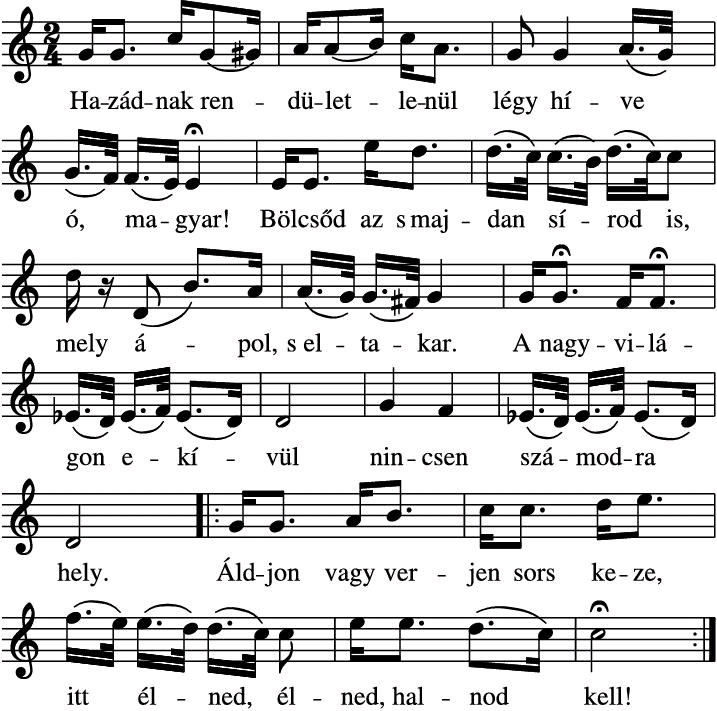 A Szózat énekkari kottája